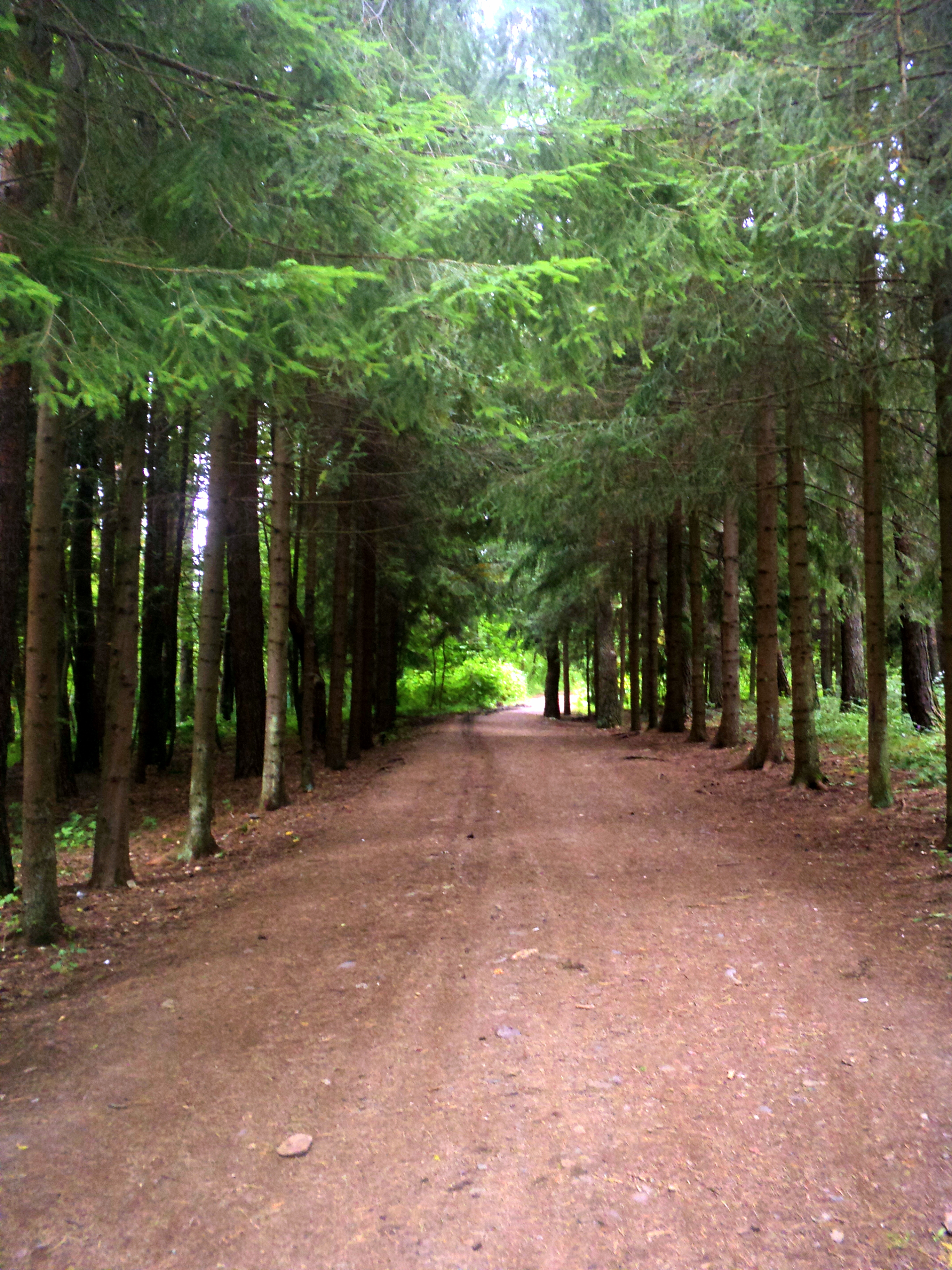 Գյուլագարակի արգելավայր, Դենդրոպարկ